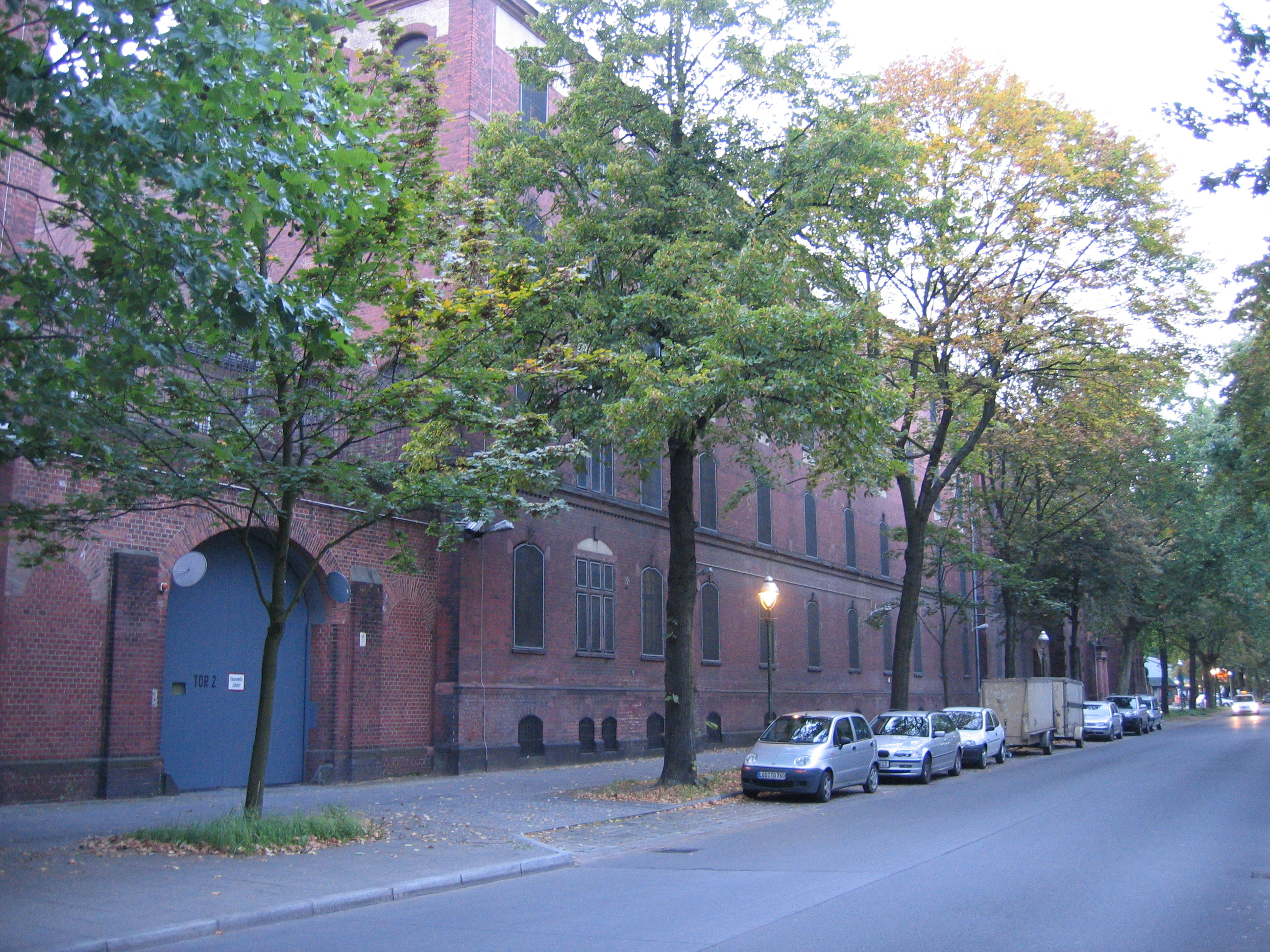 Militärgefängnis Lehrter Straße